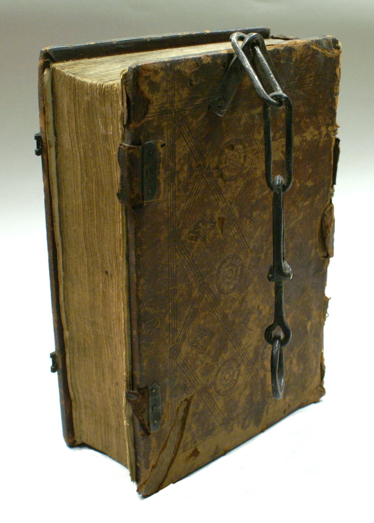 Kettenbuch, ex-bibliotheka gymnasii altonani